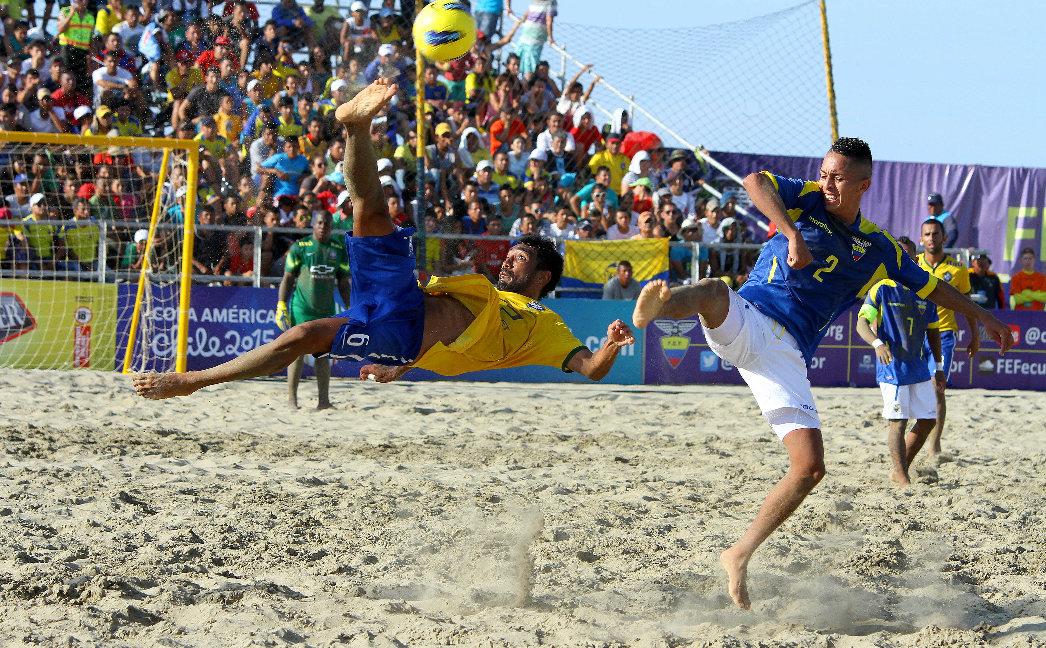 Manta, 25 de abr (Andes).-El Jugador brasileño Anderson, intenta un remate de chilena ante la marca de Hugo Ceballos en el partido frente a Ecuador en la semifinal del Sudamericano de fútbol playa 2015 Foto:César Muñoz/Andes